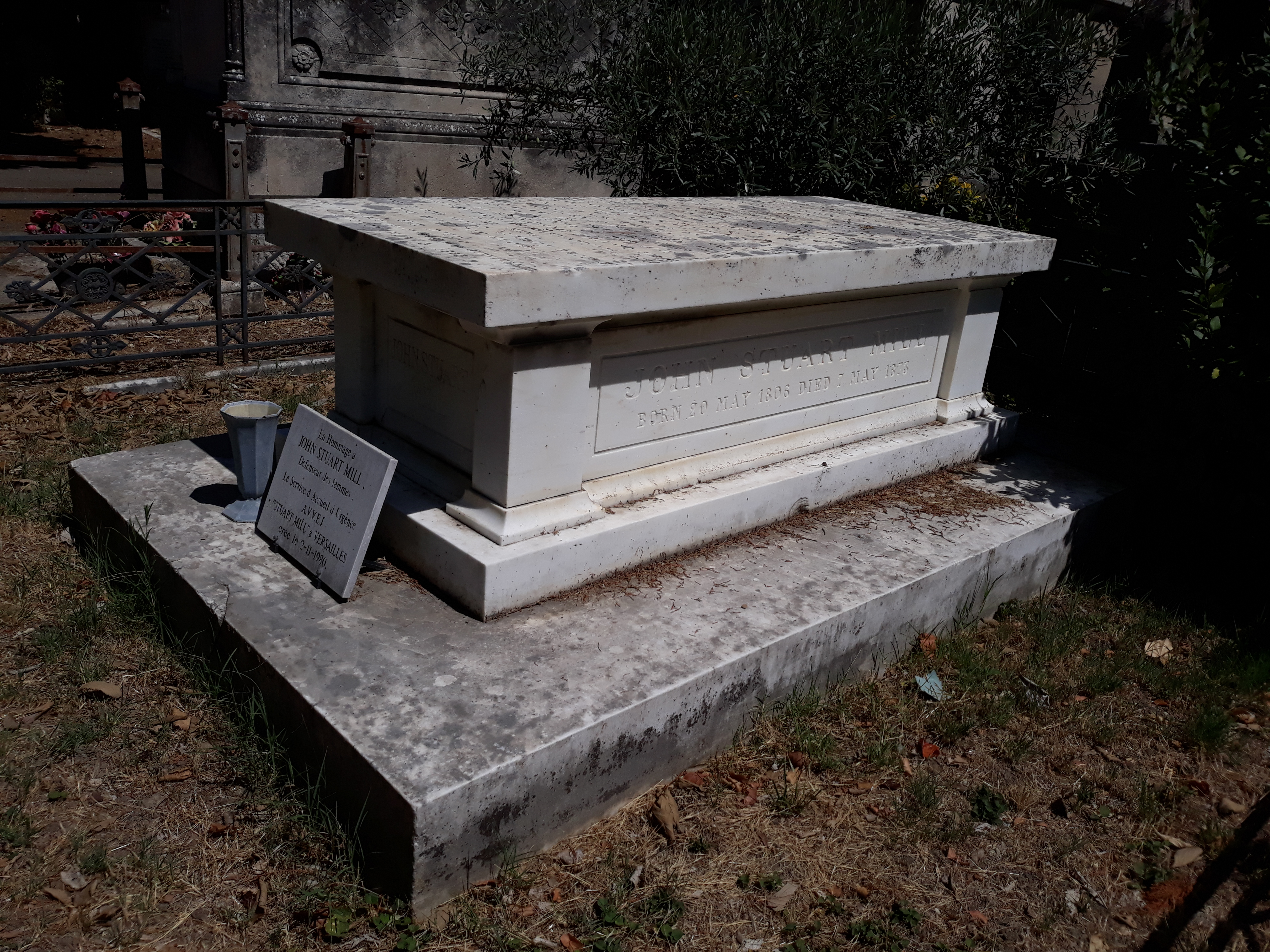 Das Grab des englischen Philosophen John Stuart Mill auf dem Friedhof Saint-Véran in Avignon.